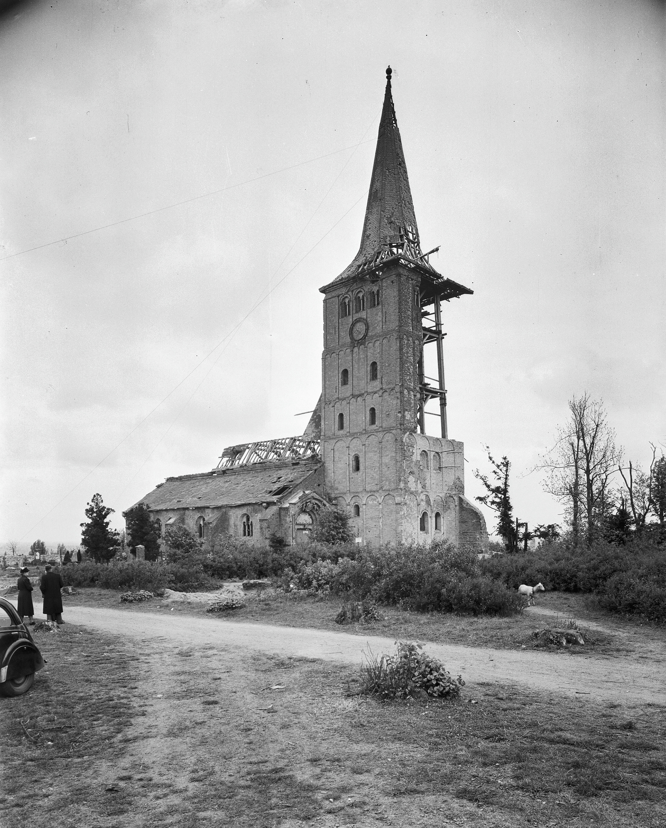 Stiftskerk: exterieur vanuit het noord-westen This is a photograph of an architectural monument.